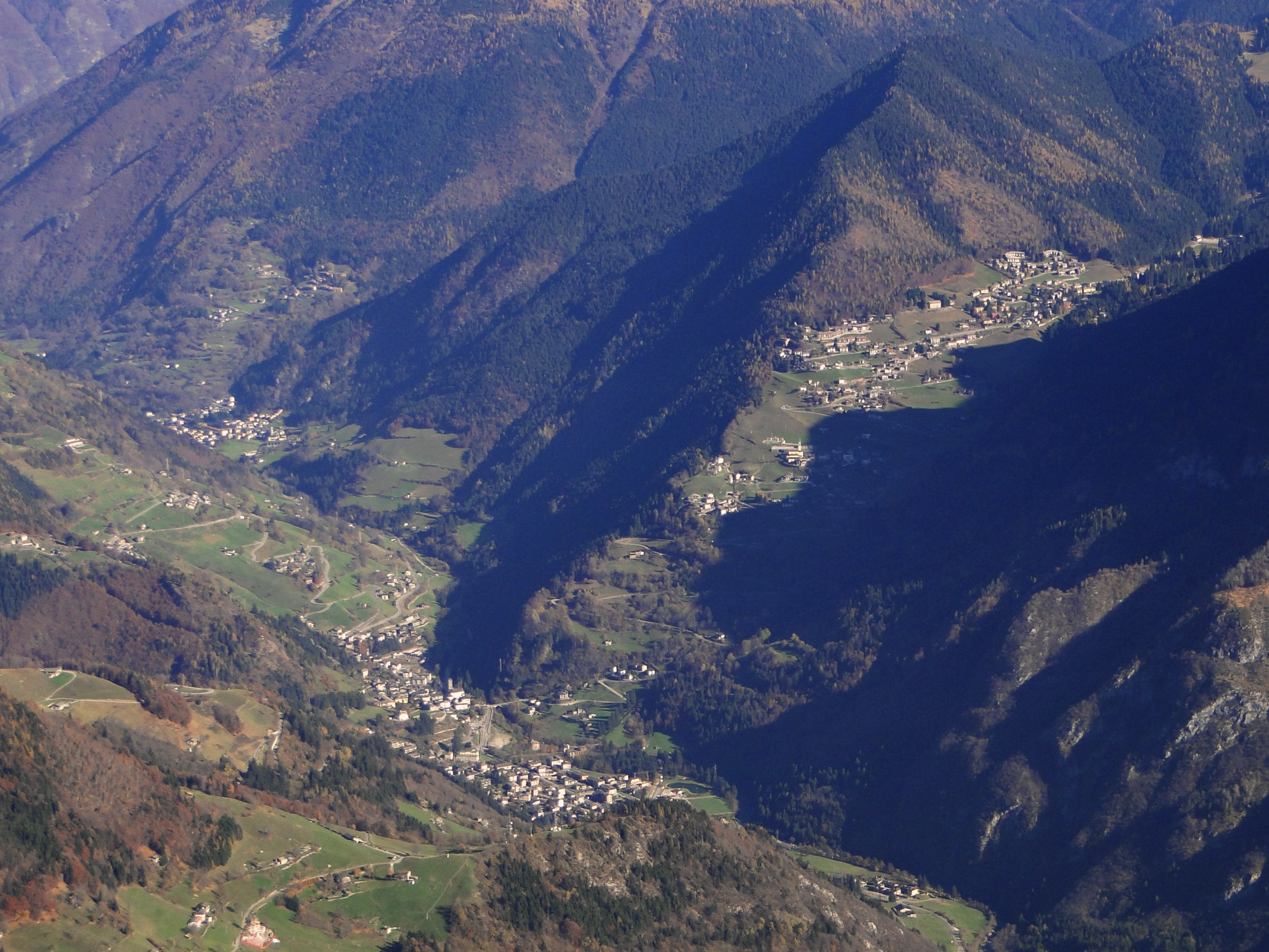 Panorama di Gromo con le frazioni Spiazzi e Ripa. Valle Seriana (BG)